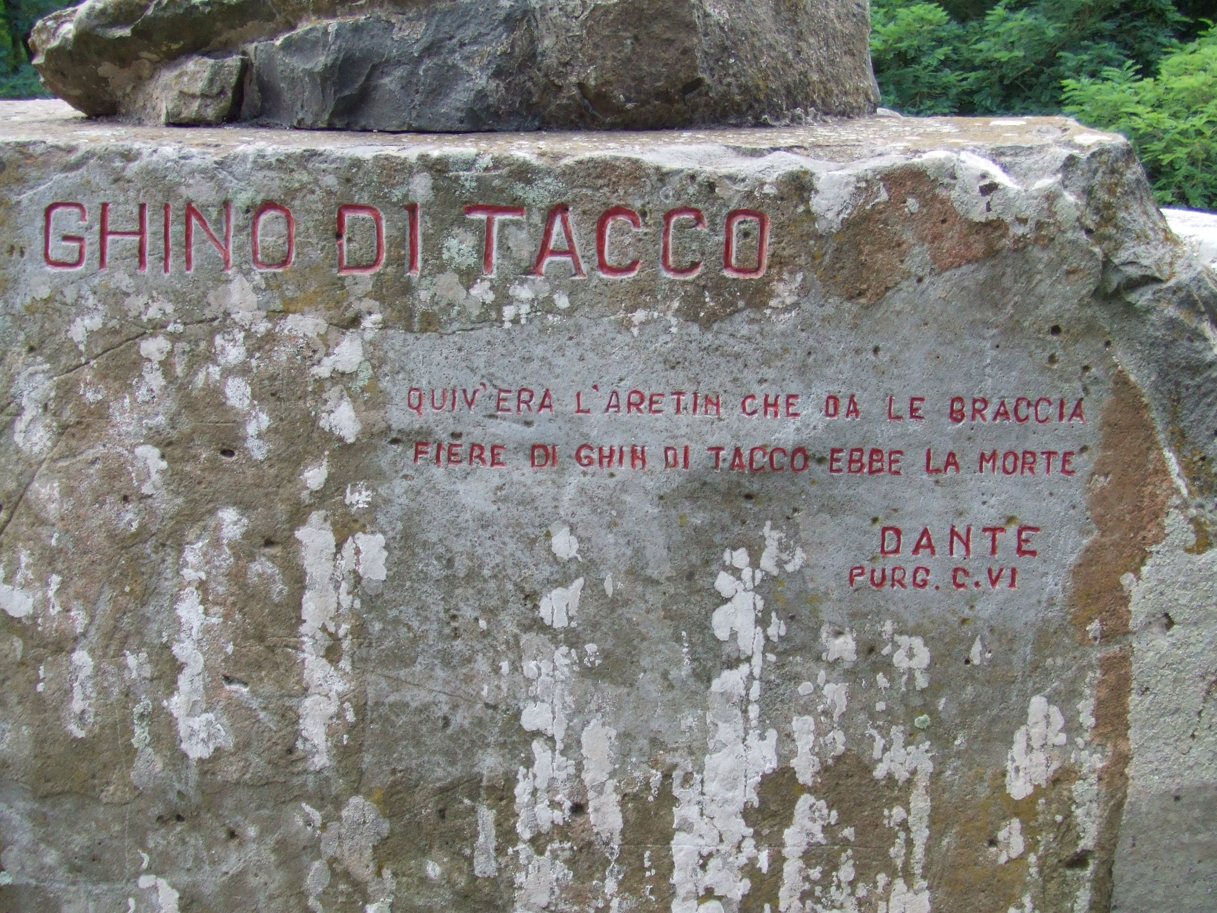 Citation de Dante sur le monument à Ghino di Tacco à Radicofani